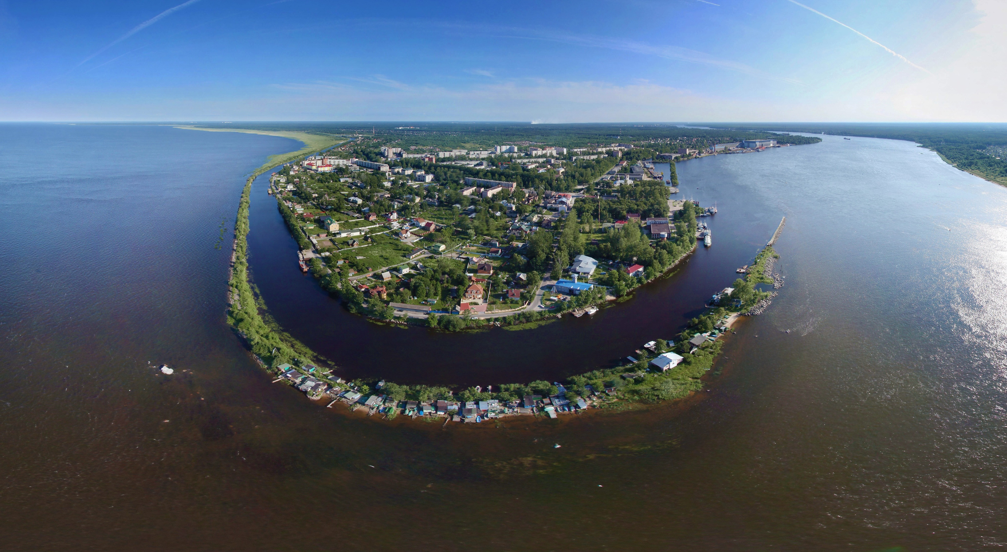 Шлиссельбург с высоты